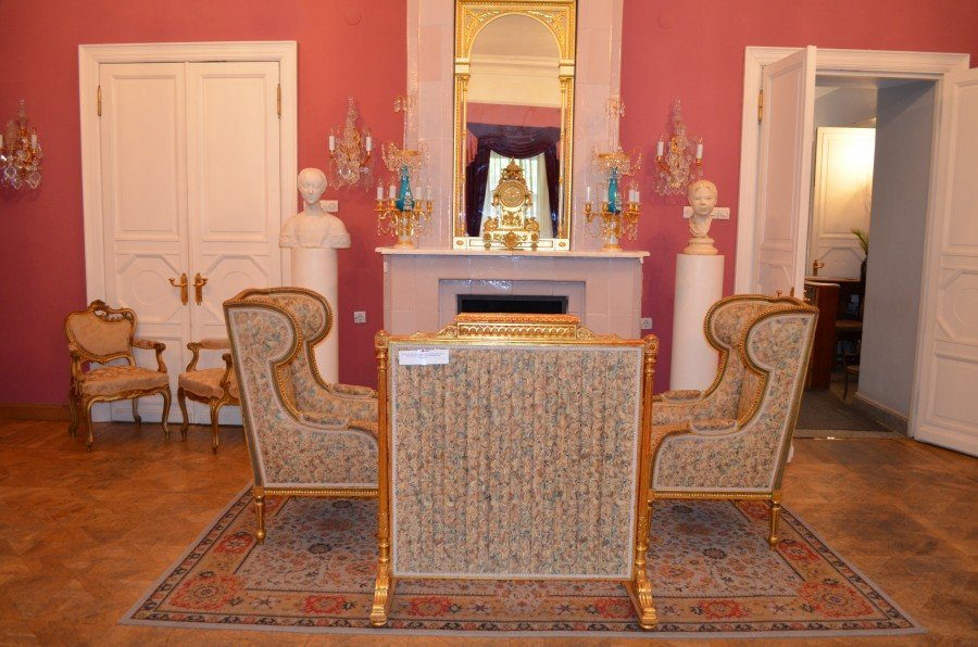 Интерьеры Музея мебели в Москве